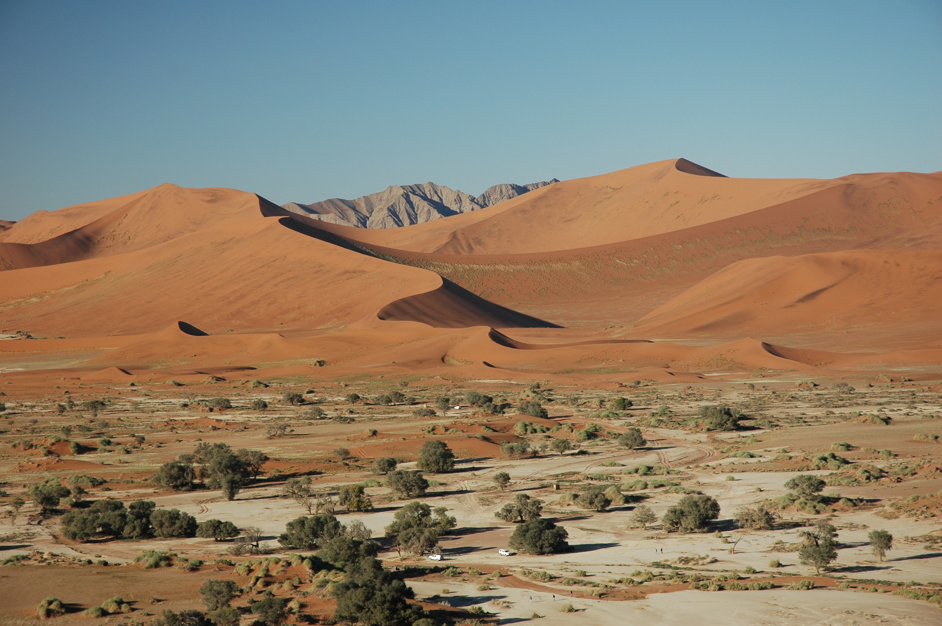 Namibie Sossusvlei Photographie prise par GIRAUD Patrick